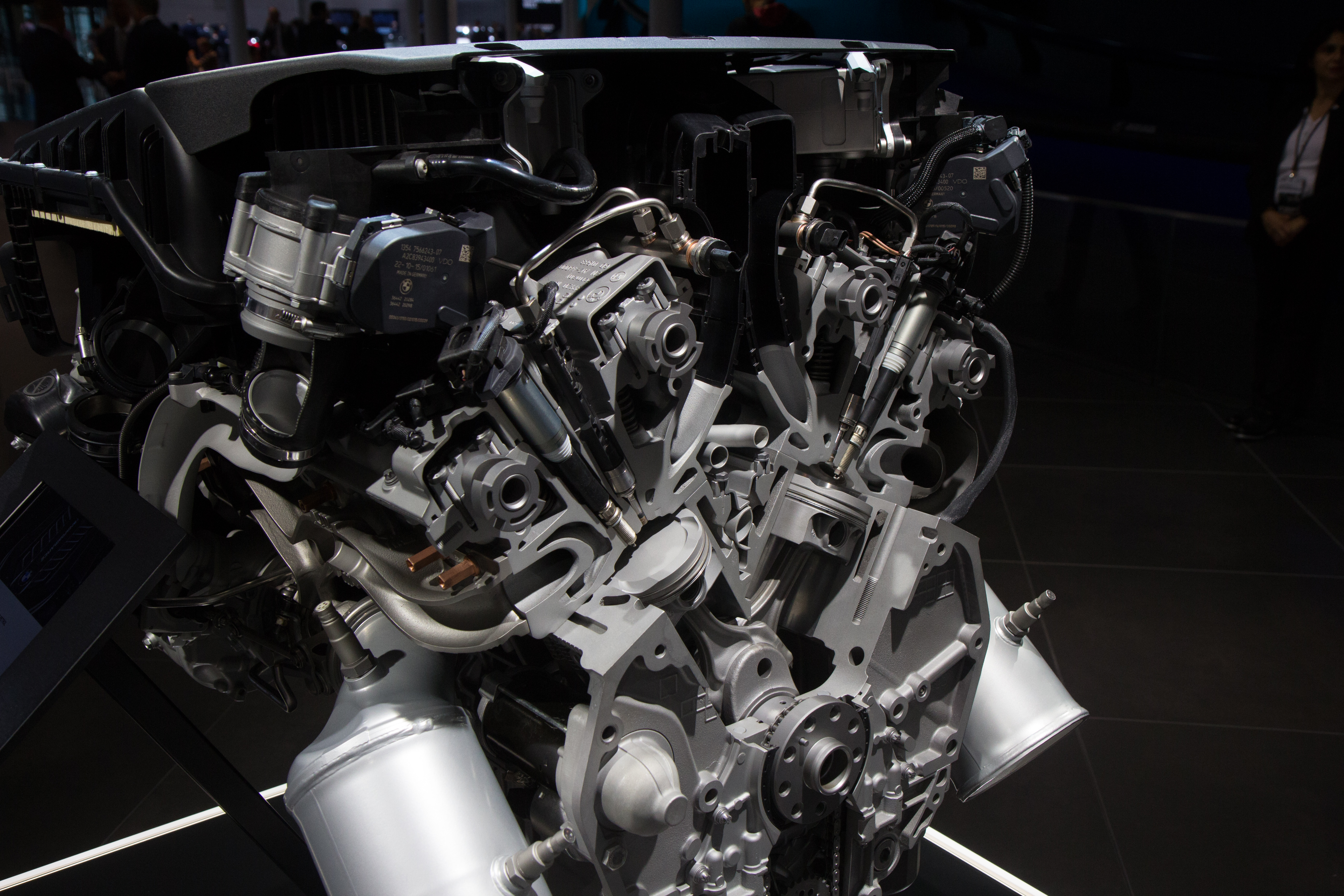 BMW Messestand auf der IAA 2017 in Frankfurt